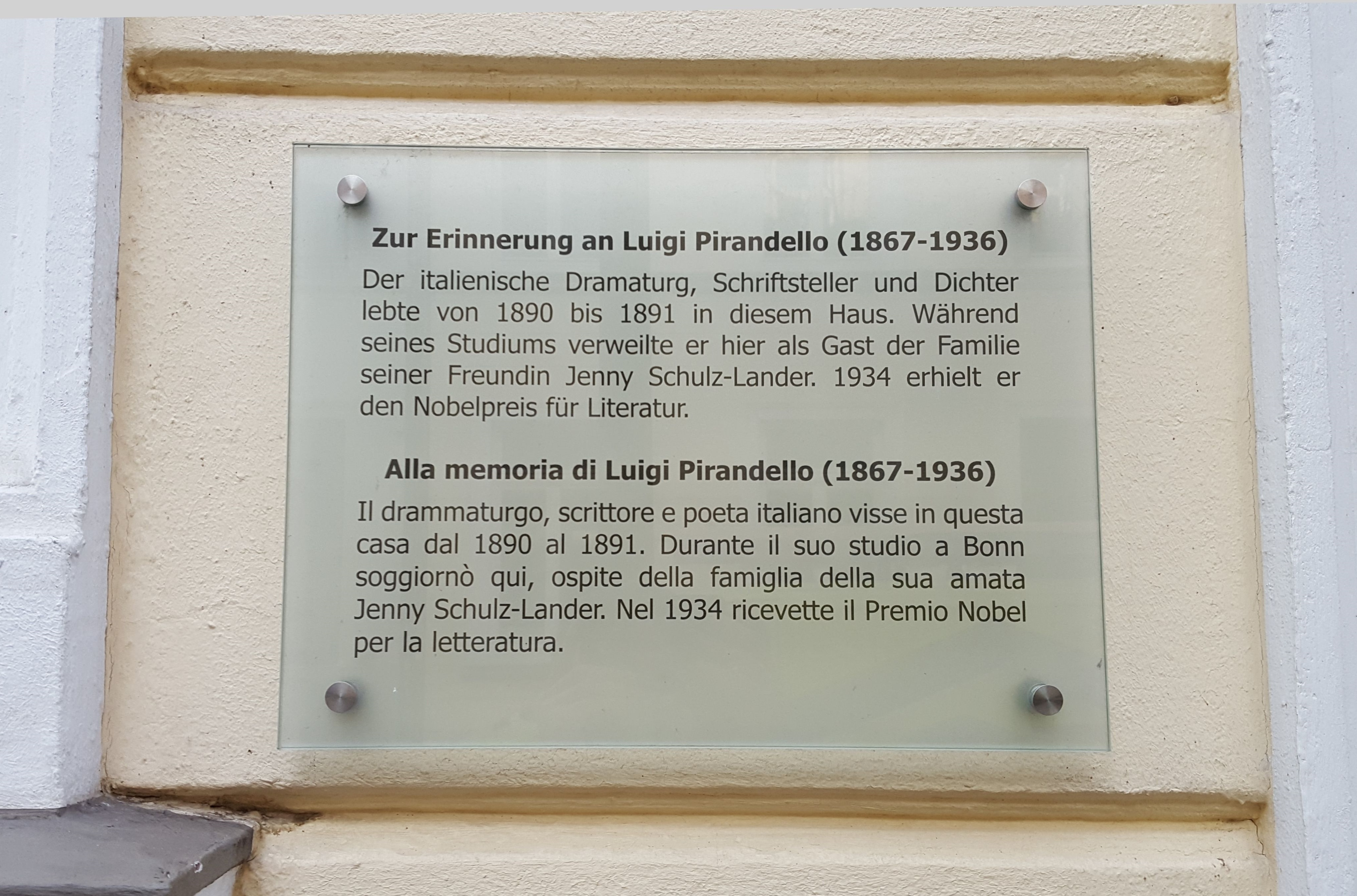 Gedenktafel für Luigi Pirandello an der Front des Hauses Breite Straße 83 in Bonn. Enthüllt am 1. September 2012 durch die Bonner Künstlerin Deva Wolfram, auf deren Initiative die Gedenktafel zurückging.[1]